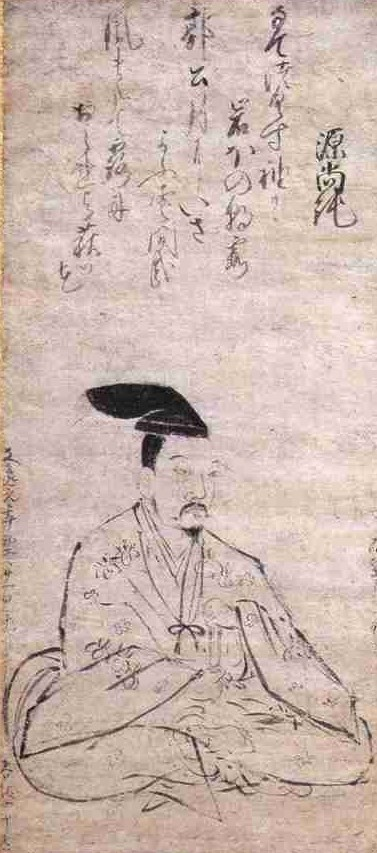 岩松尚純の肖像。